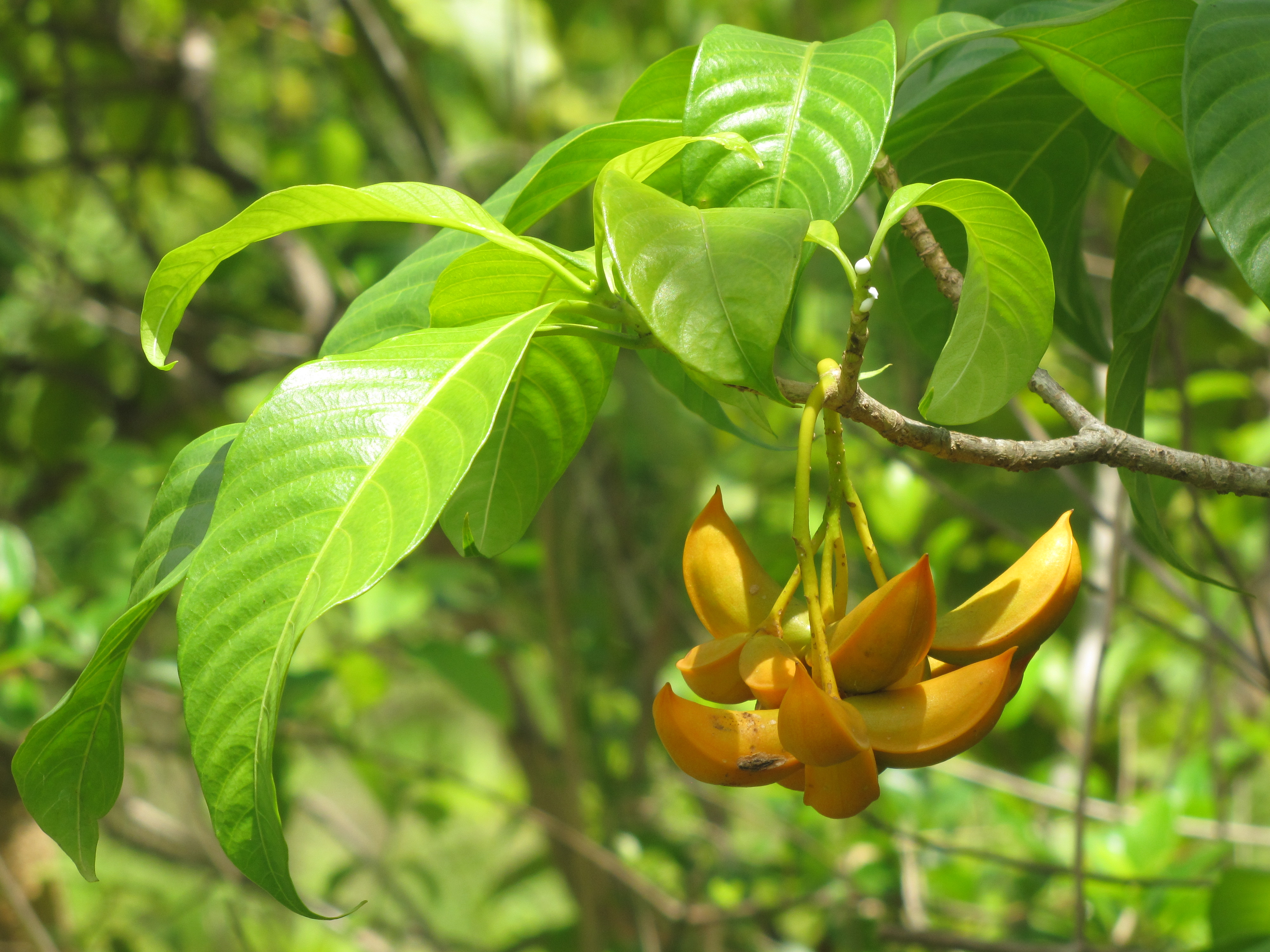 കുരുട്ടുപാല, പെരുമലയില്‍ നിന്നും.